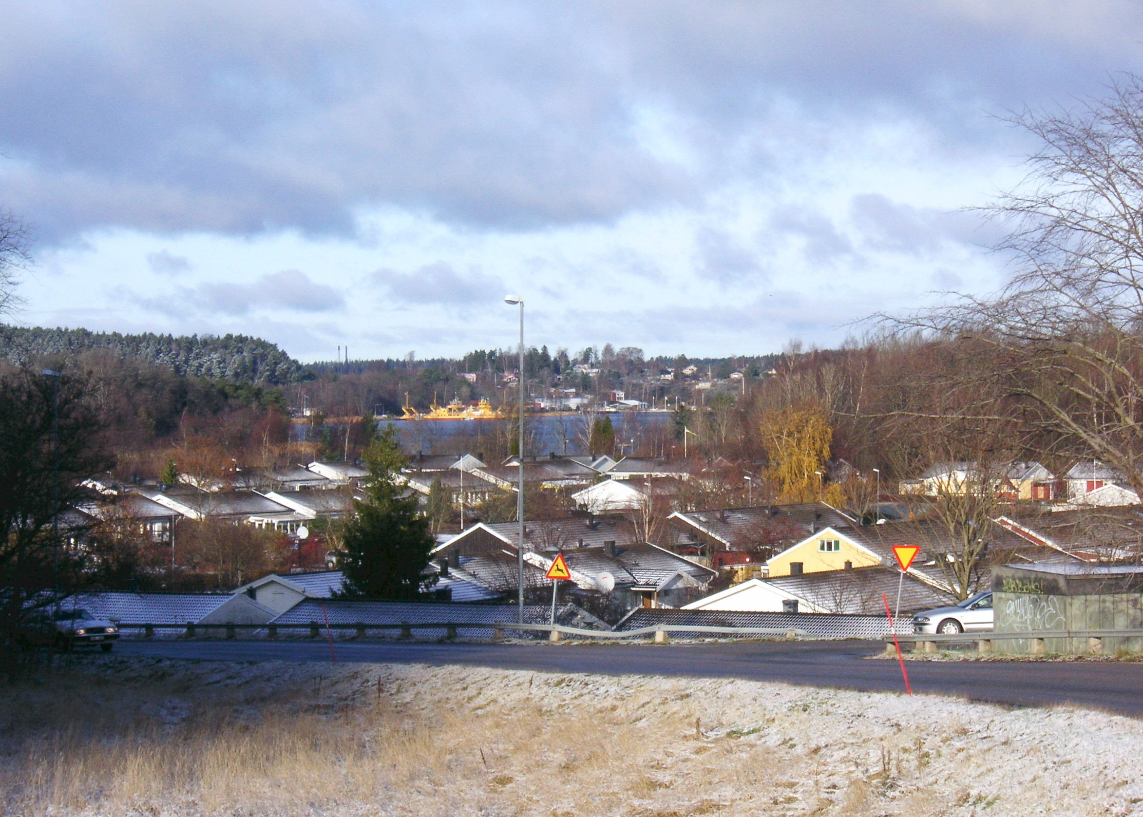 Slagsta i Huddinge kommun Sverige